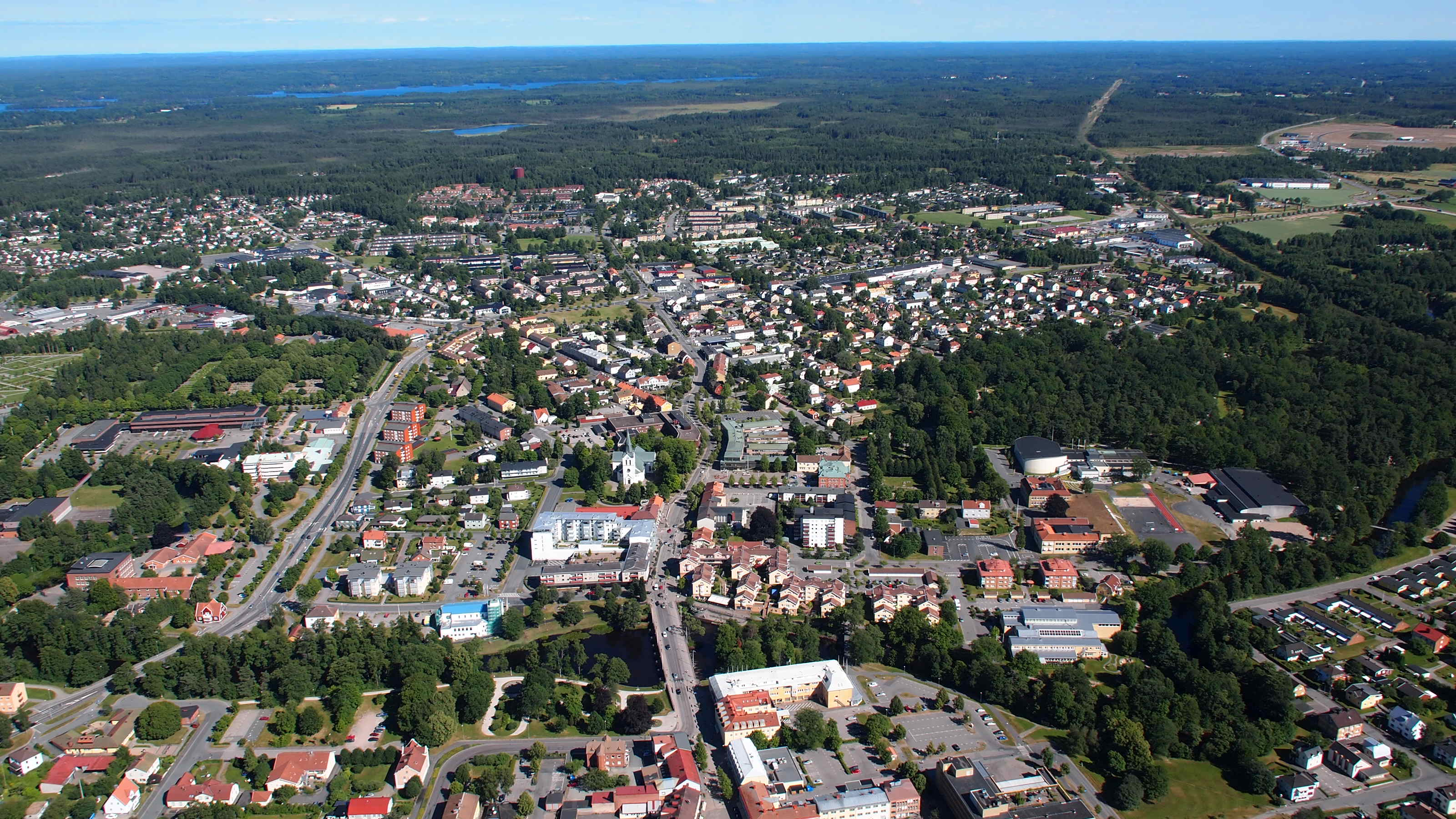 Helikopterbild Storgatan och Lagan i Värnamo tätort